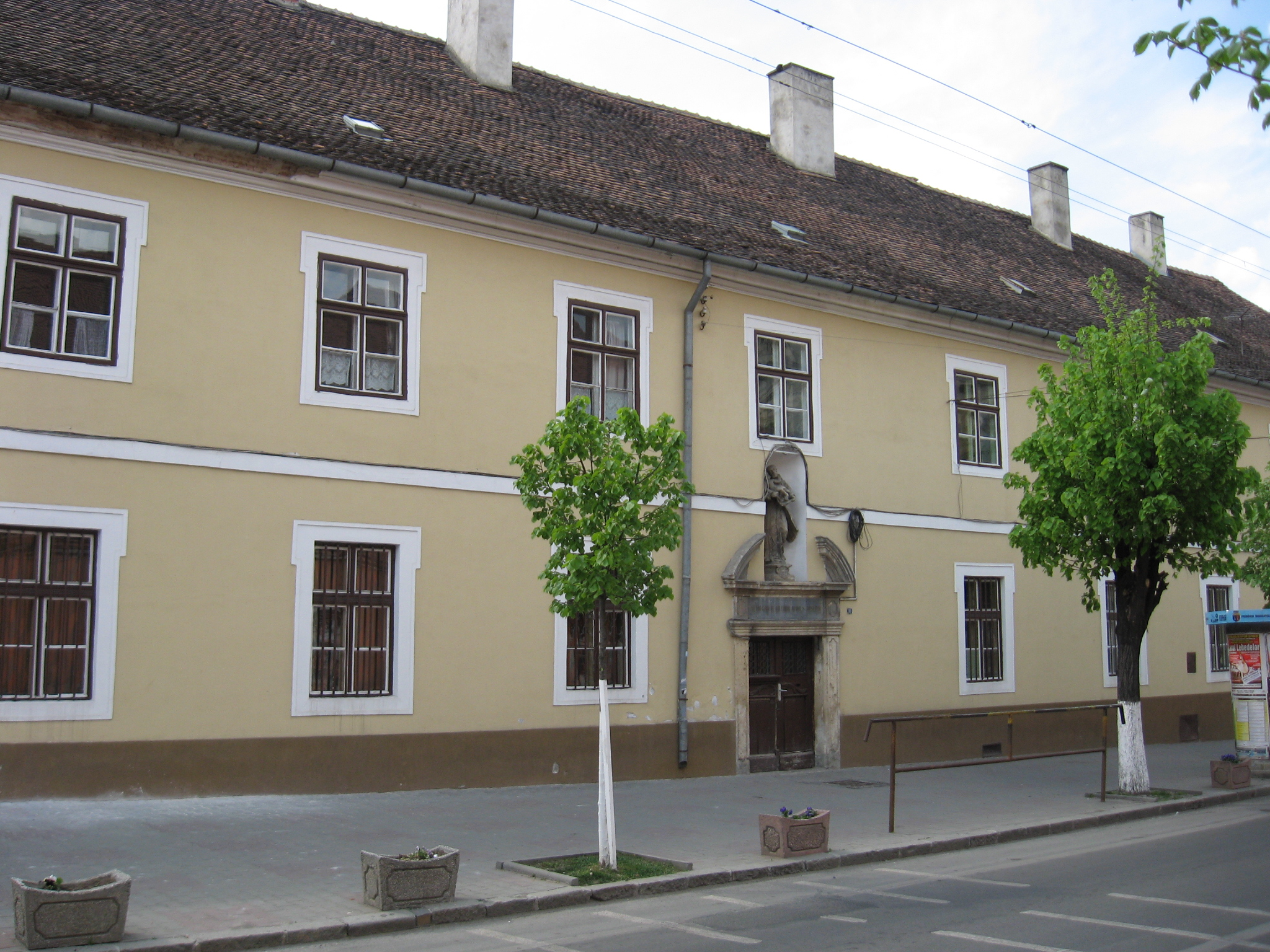 Cluj-Napoca, fostul Seminar Báthory Apor (azi liceu), str.Universităţii nr.10